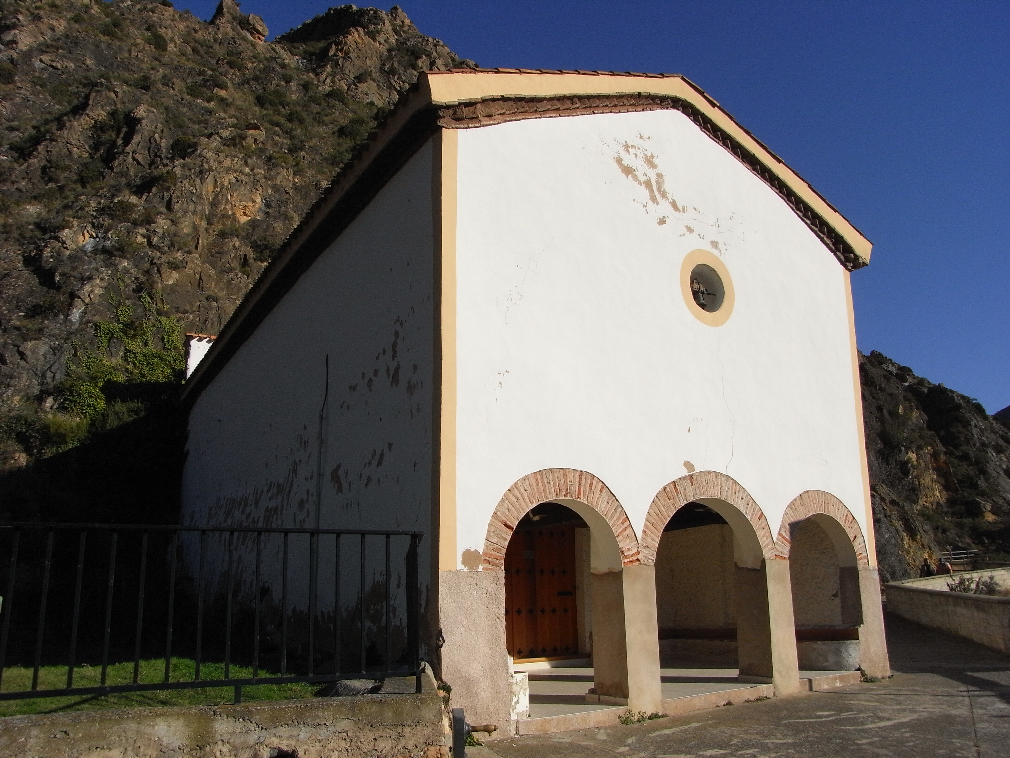 Ermita de San Andrés en Arnedillo, La Rioja (España)